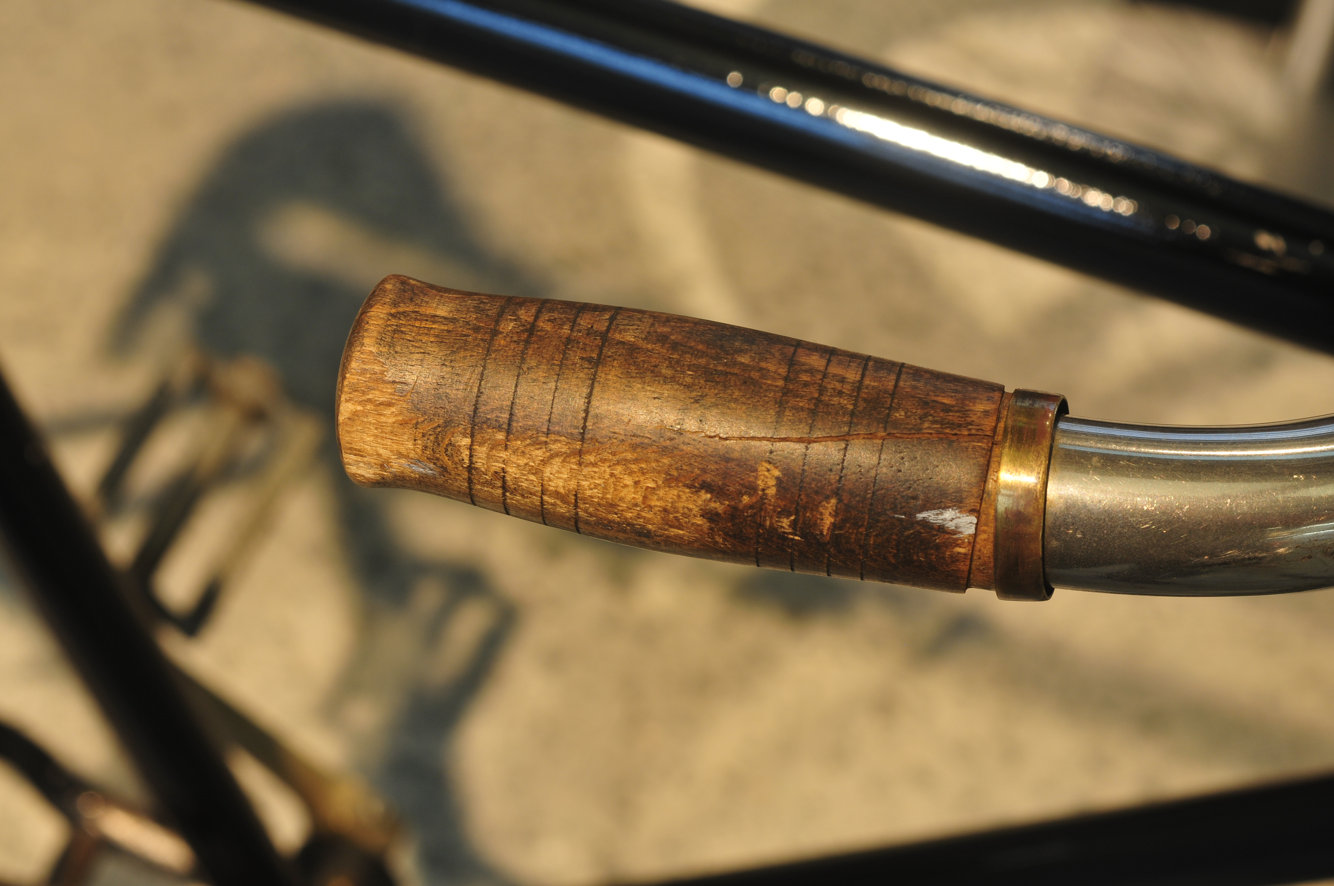 Fototermin Škoda Museum Mladá Boleslav 2013 Fototermin Škoda Muzeum 5. April 2013 in Mladá Boleslav This work is free and may be used by anyone for any purpose. If you wish to use this content, you do not need to request permission as long as you follow any licensing requirements mentioned on this page.